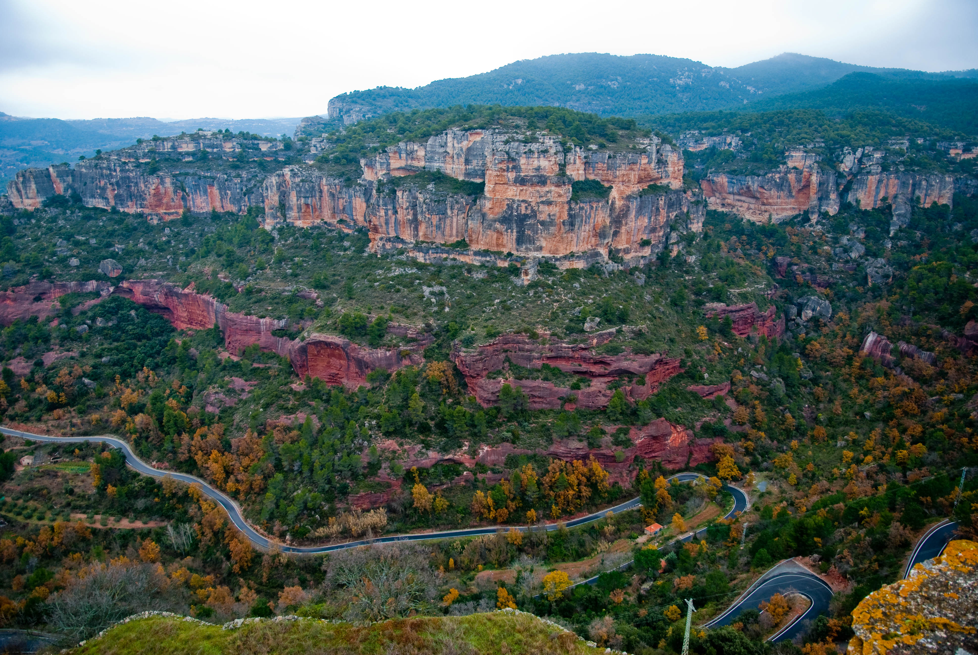 Siurana's road